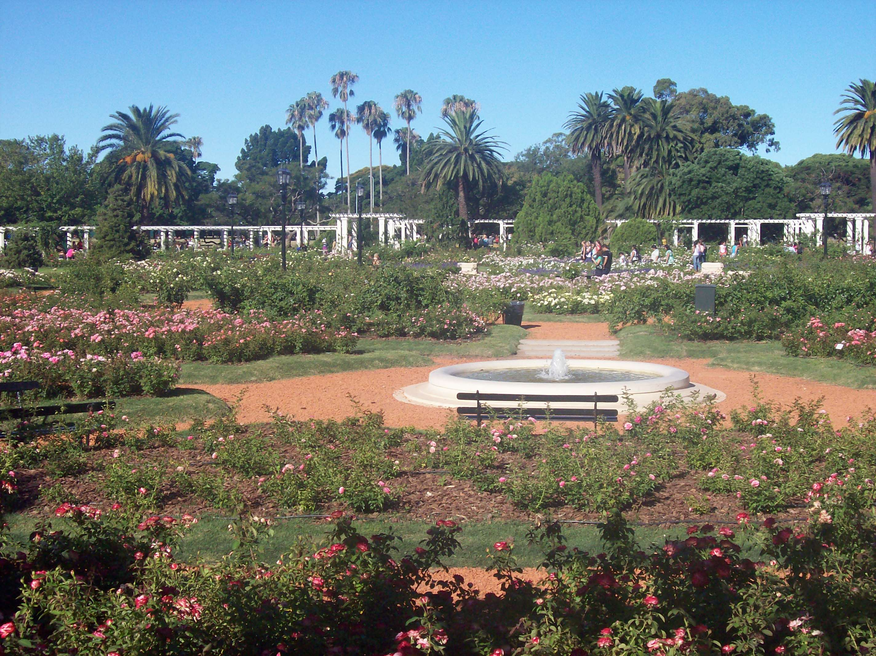 Pérgola y rosas en el Rosedal Palermo, Buenos Aires (Parque 3 de Febrero)